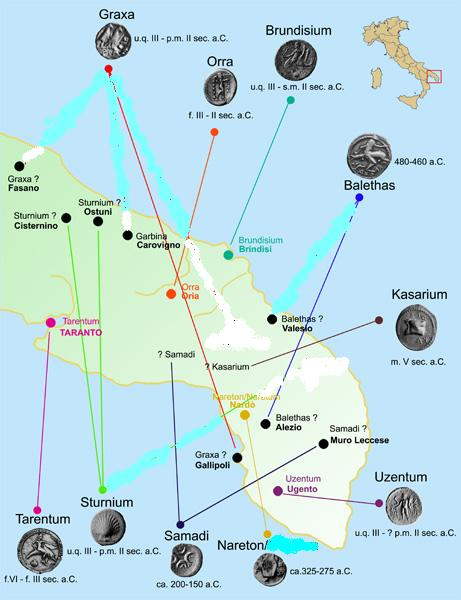 grafico